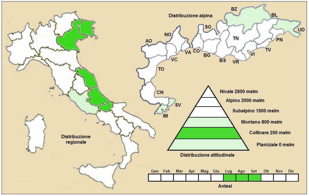 Anethum graveolens - Distribuzione